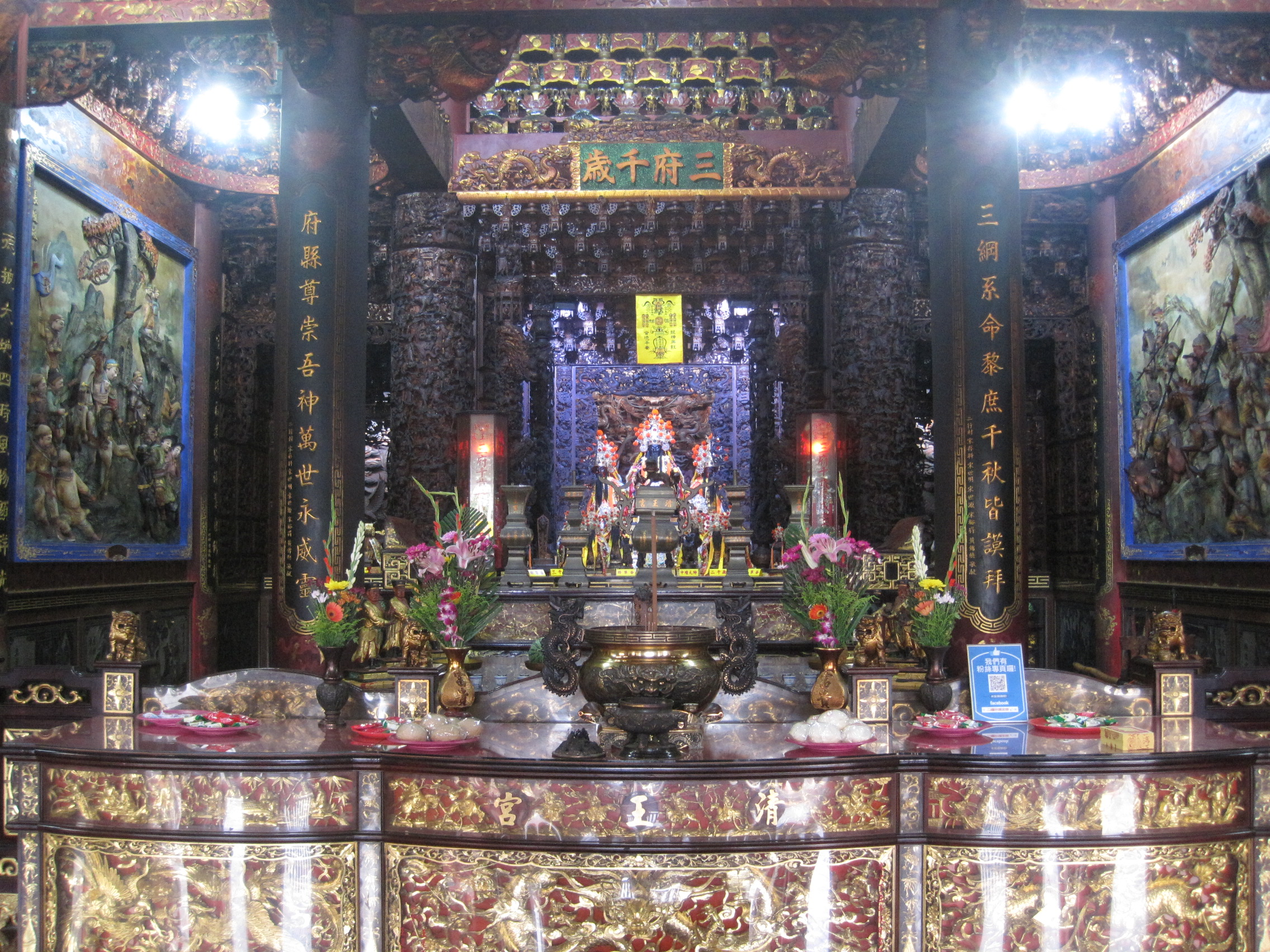 二層行清王宮正殿